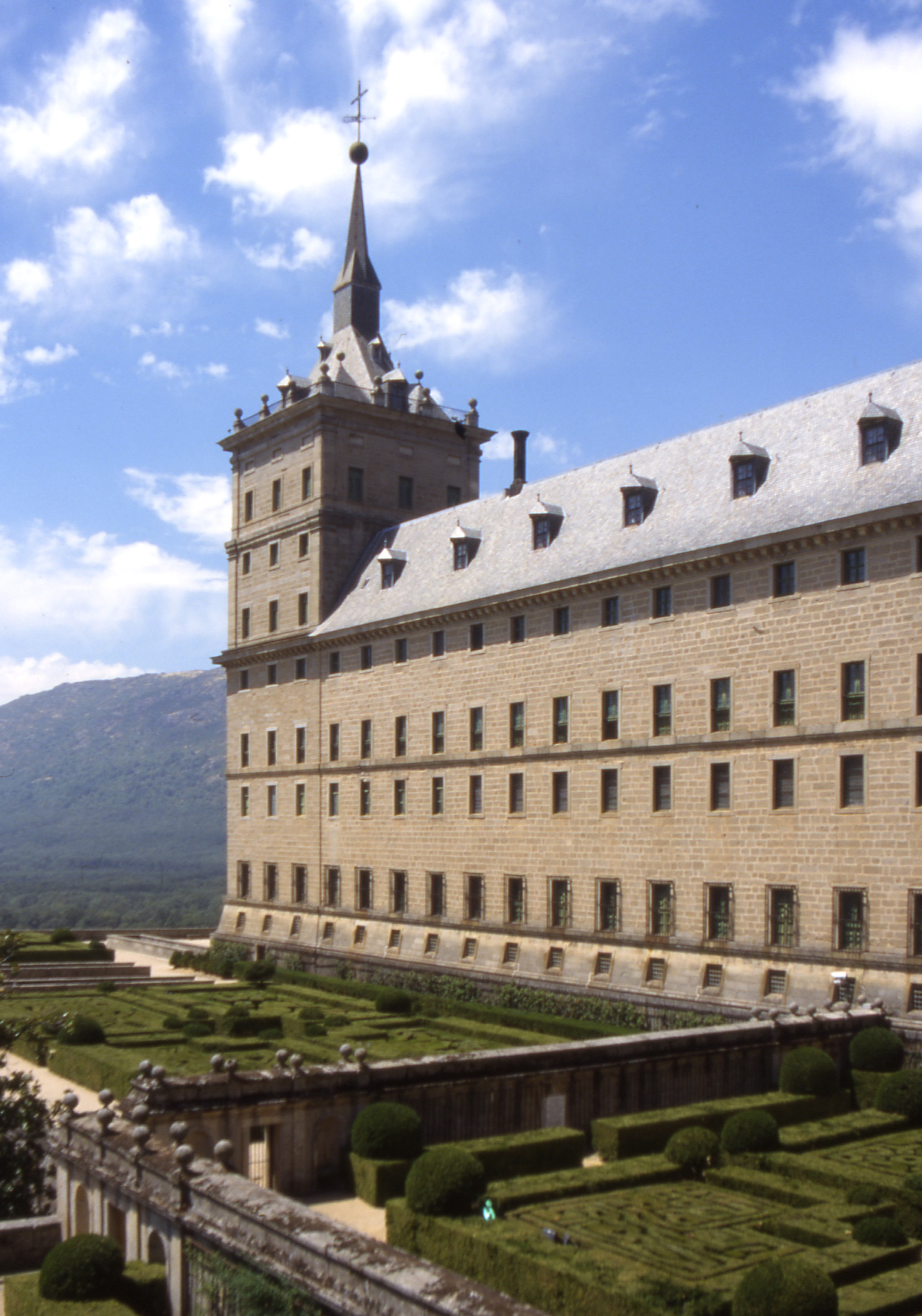 El Escorial Ansicht